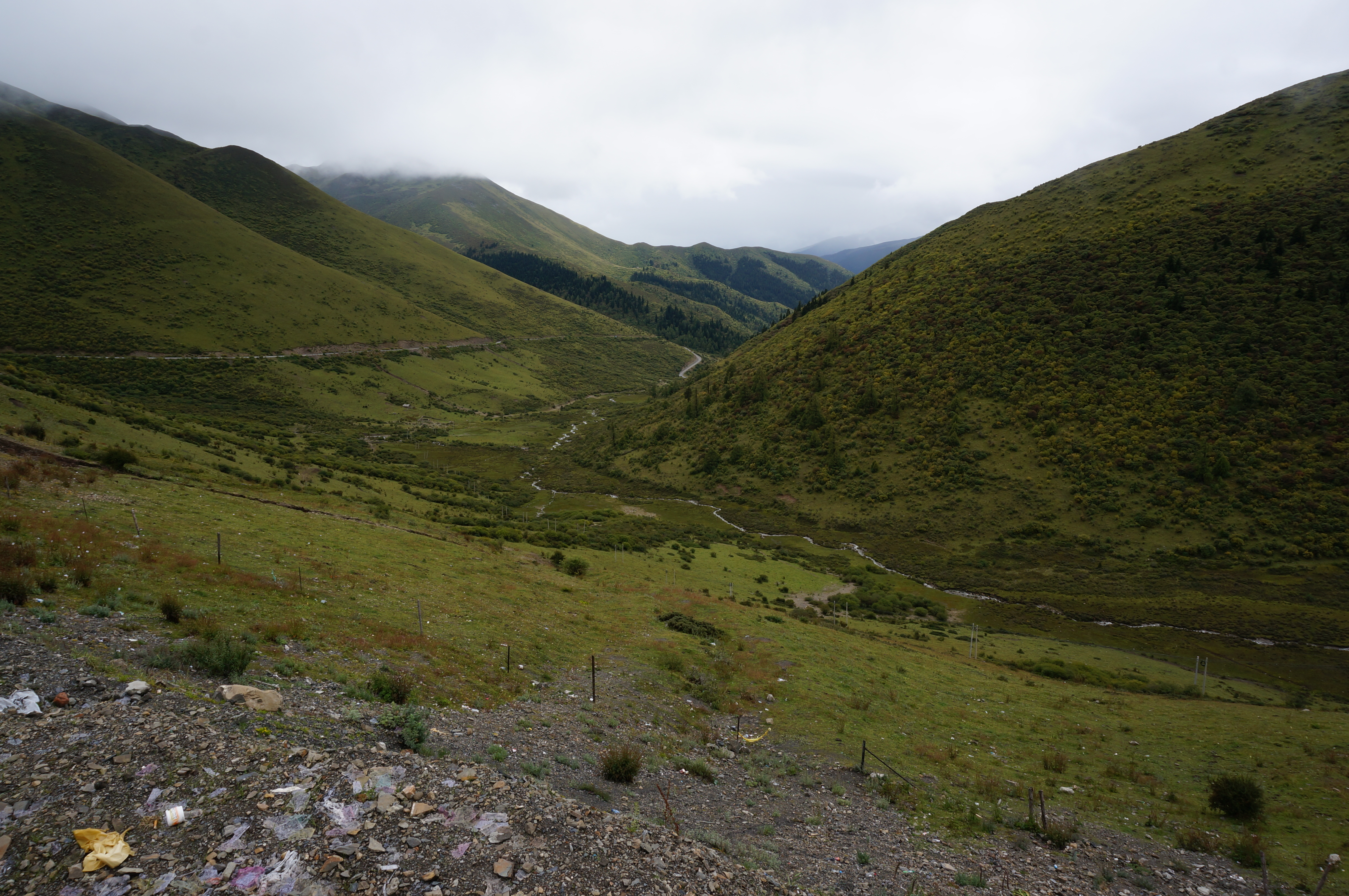 马尔康县梦笔山河谷风景。